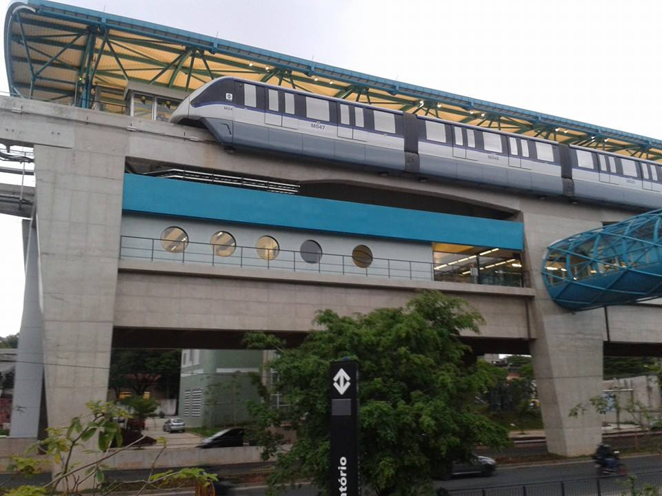 Composição M04 da linha 15 - Prata do metrô parada na Estação Oratório (ORT)